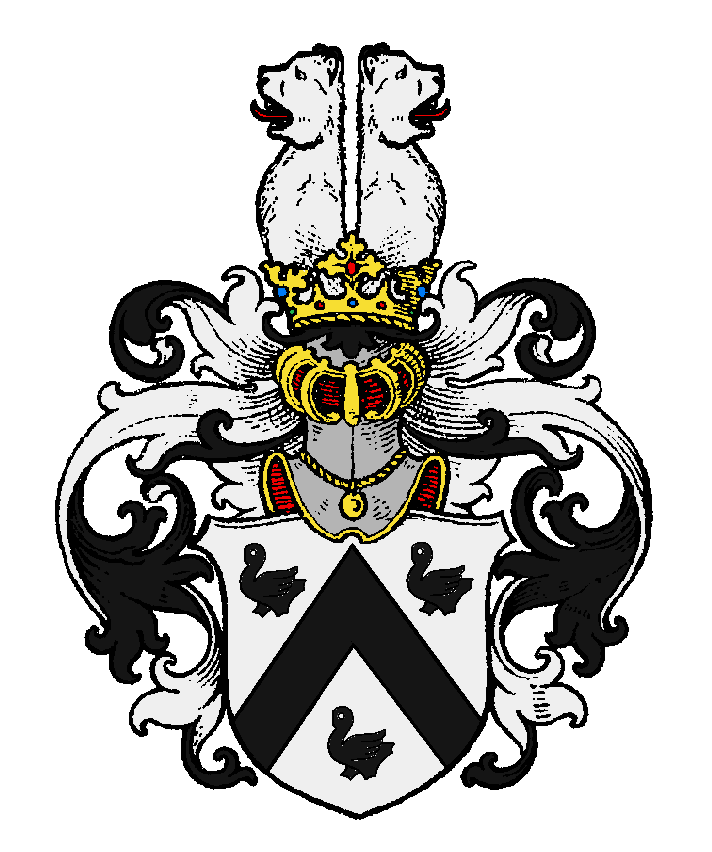 Stammwappen der von Hoverbeck (d'Overbeke; van Overbeke), einem aus Brabant stammenden Adelsgeschlecht.